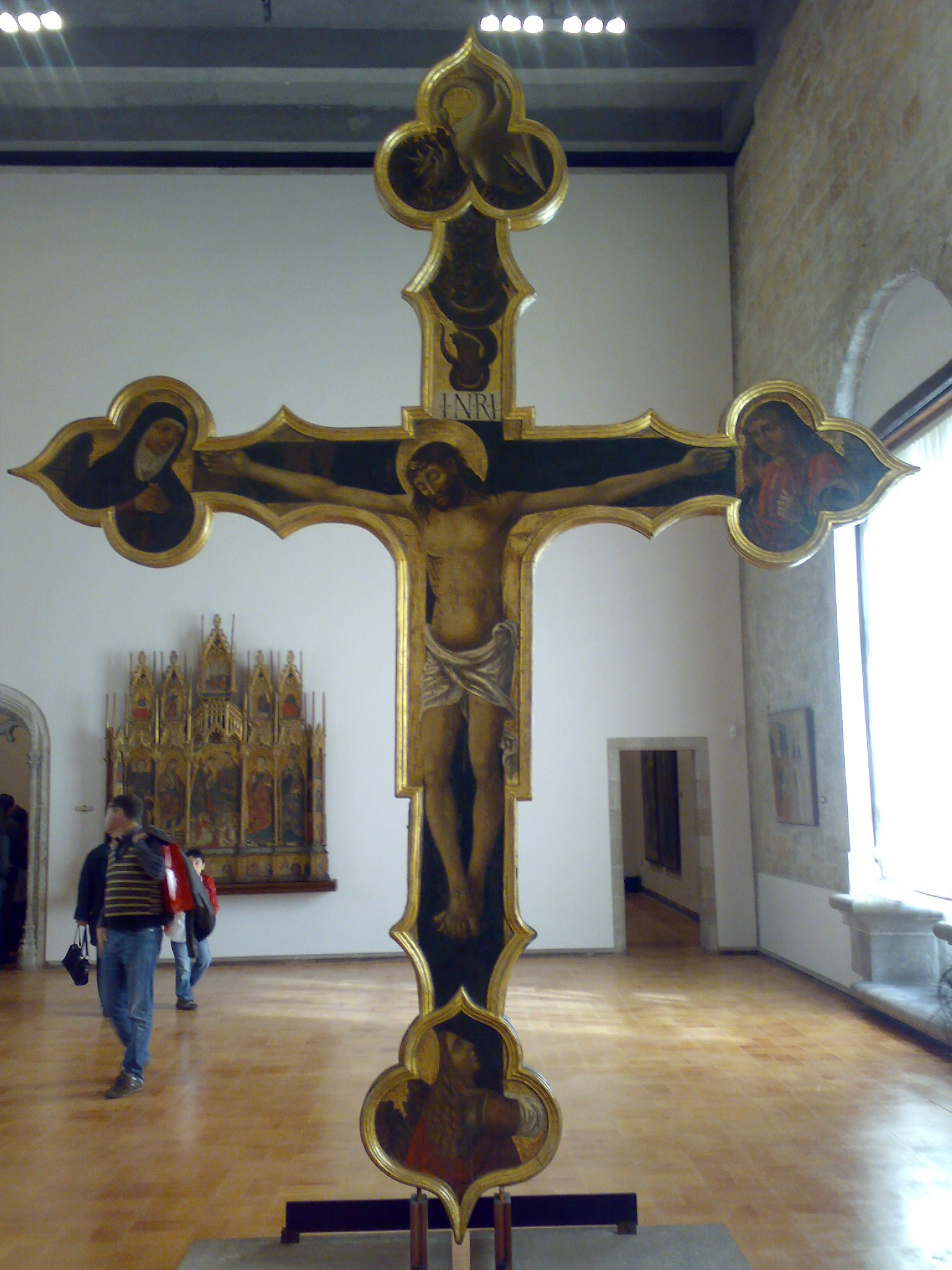 Sala delle Croci di Palazzo Abatellis, croce in legno dipinta da Pietro Ruzzolone (attivo a Palermo tra il 1484 e il 1522).